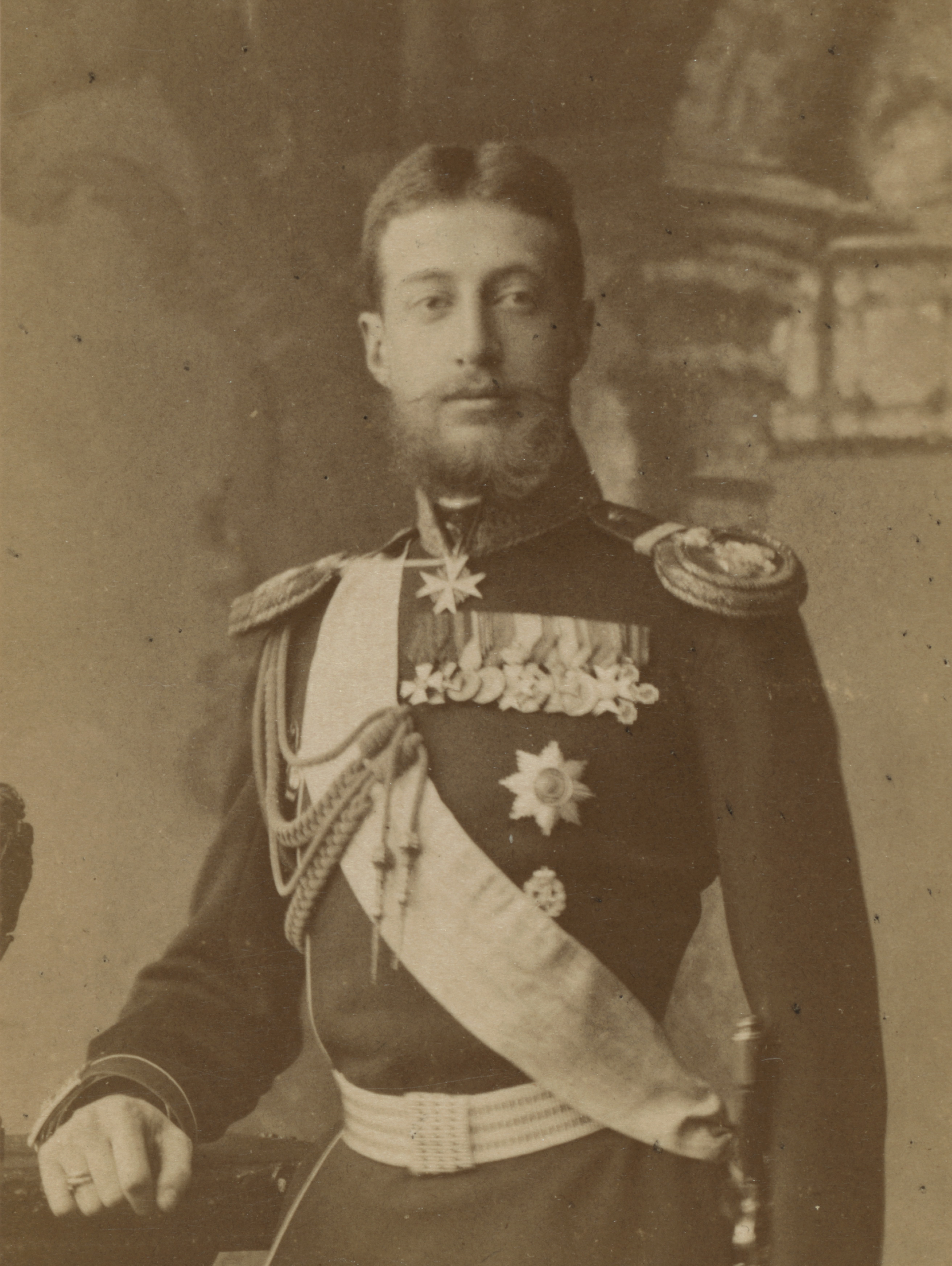 Grand Duke Konstantin Konstantinovich